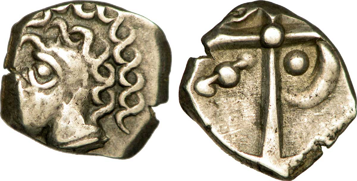 Drachme “à la tête négroïde” frappé par les Tolosates Date : IIe-Ier siècles av. J.-C. Description avers : Tête stylisée à gauche, de type négroïd,et un sourcil important et allongé, la chevelure représentée par trois rangs de petites esses entrelacées .